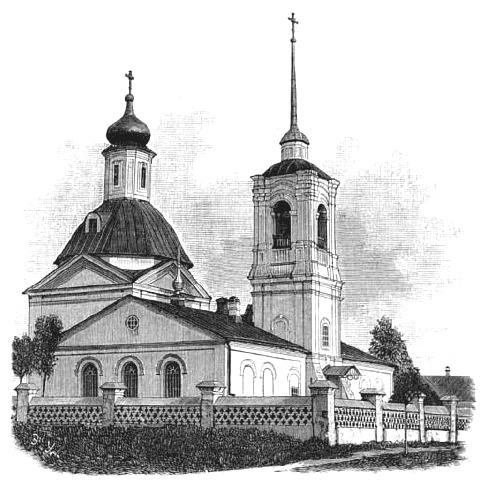 Церковь в селе Спасском, родовом имении М. Д. Скобелева, в Раненбургском уезде Рязанской губернии